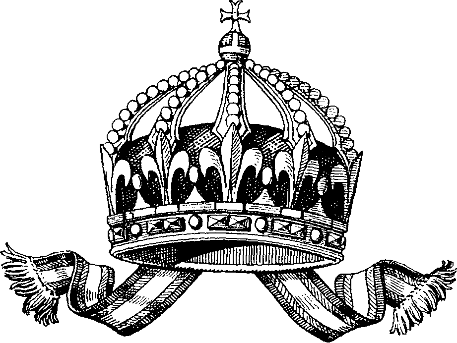 Krone des halbsouveränen Fürsten von Bulgarien